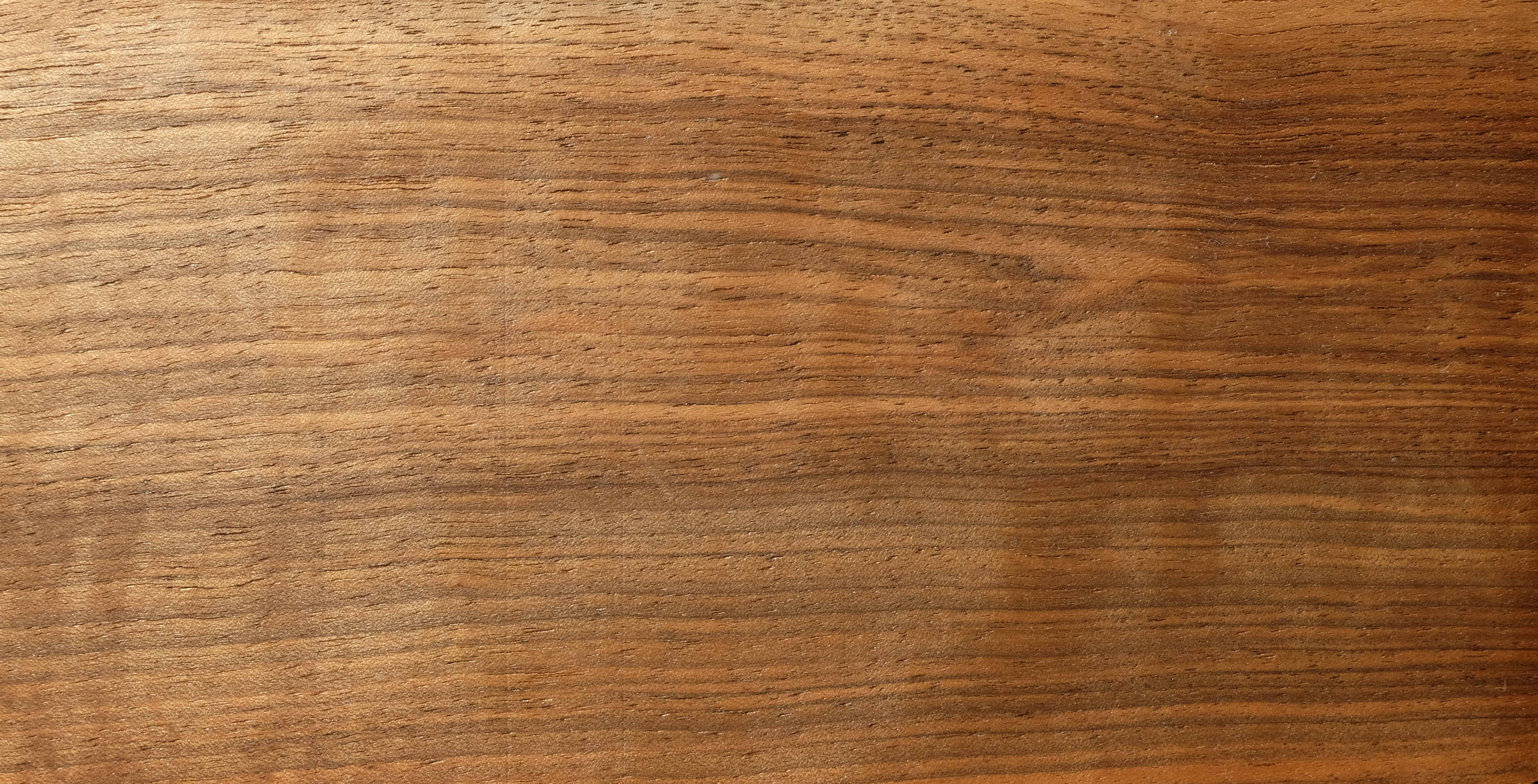 gemessertes Furnier; Holzart: NB, Nussbaum, Walnussbaum